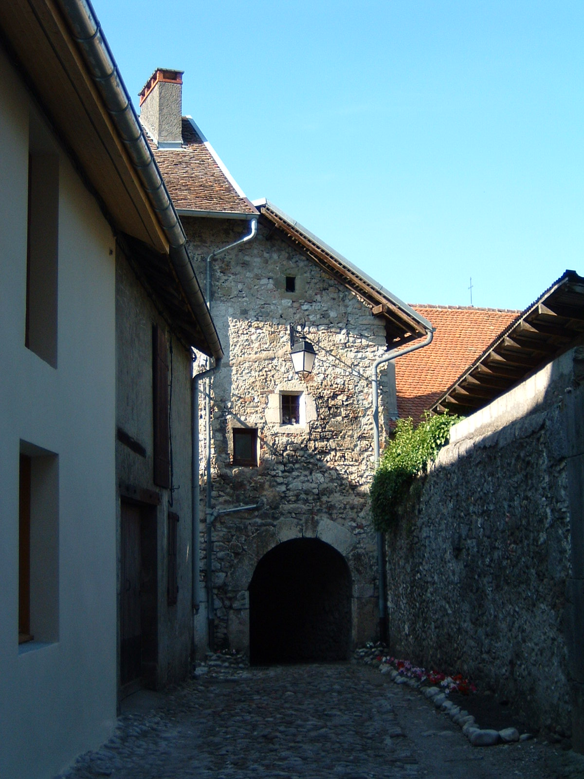 Ruelle médiévale de Yenne.